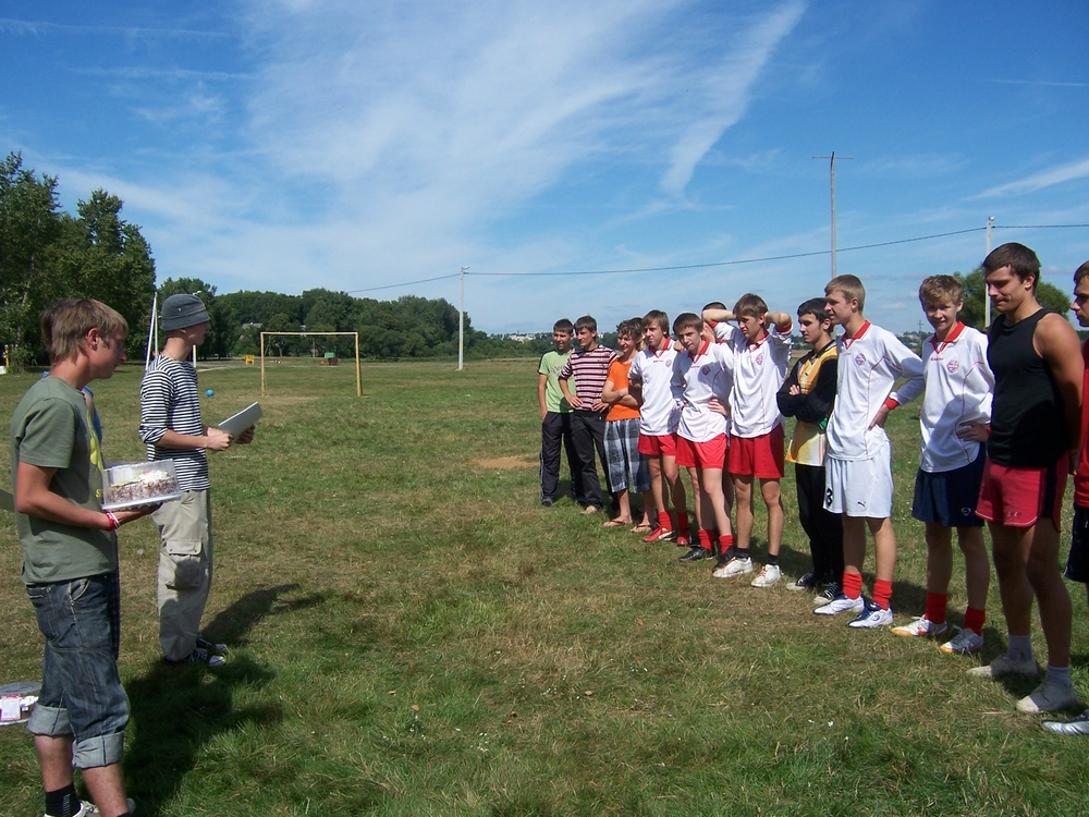 турнир